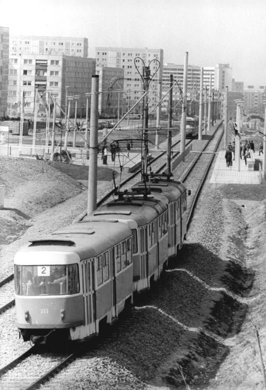 Schwerin, Straßenbahn ADN-ZB Pätzold-18.4.1984 Schwerin: Eine erweiterte Straßenbahnterrasse verbindet seit wenigen Tagen den jüngsten Bauabschnitt des Schweriner Neubaugebiets Großer Dreesch mit dem Städtezentrum und dem Industriekomplex Schwerin-Süd. Für rund 17000 Schweriner verbesserten sich damit die Nachverkehrsbedingungen. Das Streckennetz der Straßenbahn beträgt nunmehr in der mecklenburgischen Bezirksstadt fast 22 Kilometer.